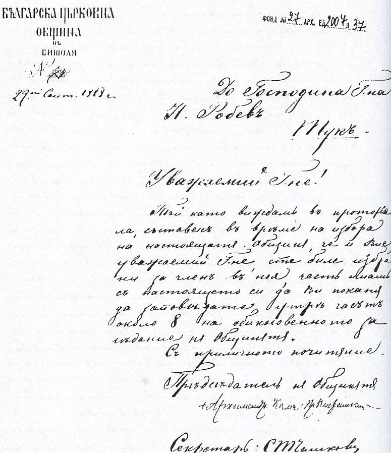 Писмо на Козма Дебърски (1835 - 1916) до Никола Робев. БЪЛГАРСКА ЦЪРКОВНА ОБЩИНА В Битоля 29-ий септ. 1888 година До Господина Г-на Н. Робев Тук Уважаемий Г-не! Тъй като виждам в протокола, съставен във време на избора на настоящата община, че и Вие уважаемий Г-не сте биле избрани за член в нея, чест имам с настоящето си да Ви поканя да заповядате утре часът около 8 на обикновеното заседание на общината. С приличното почитание Председател на общината: Архимандрит Козма Пречистански